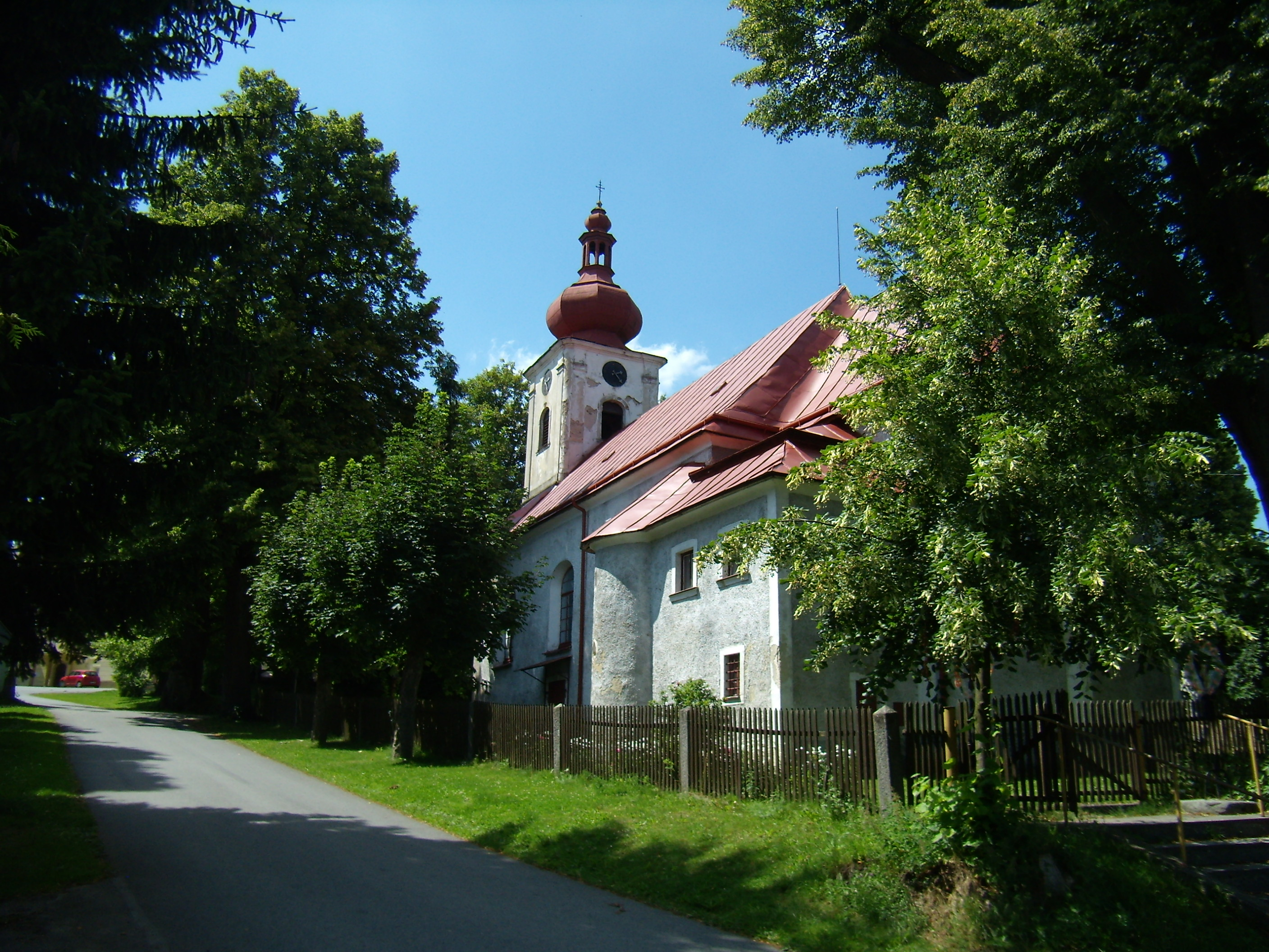 Lesná - kostel svatého Mikuláše